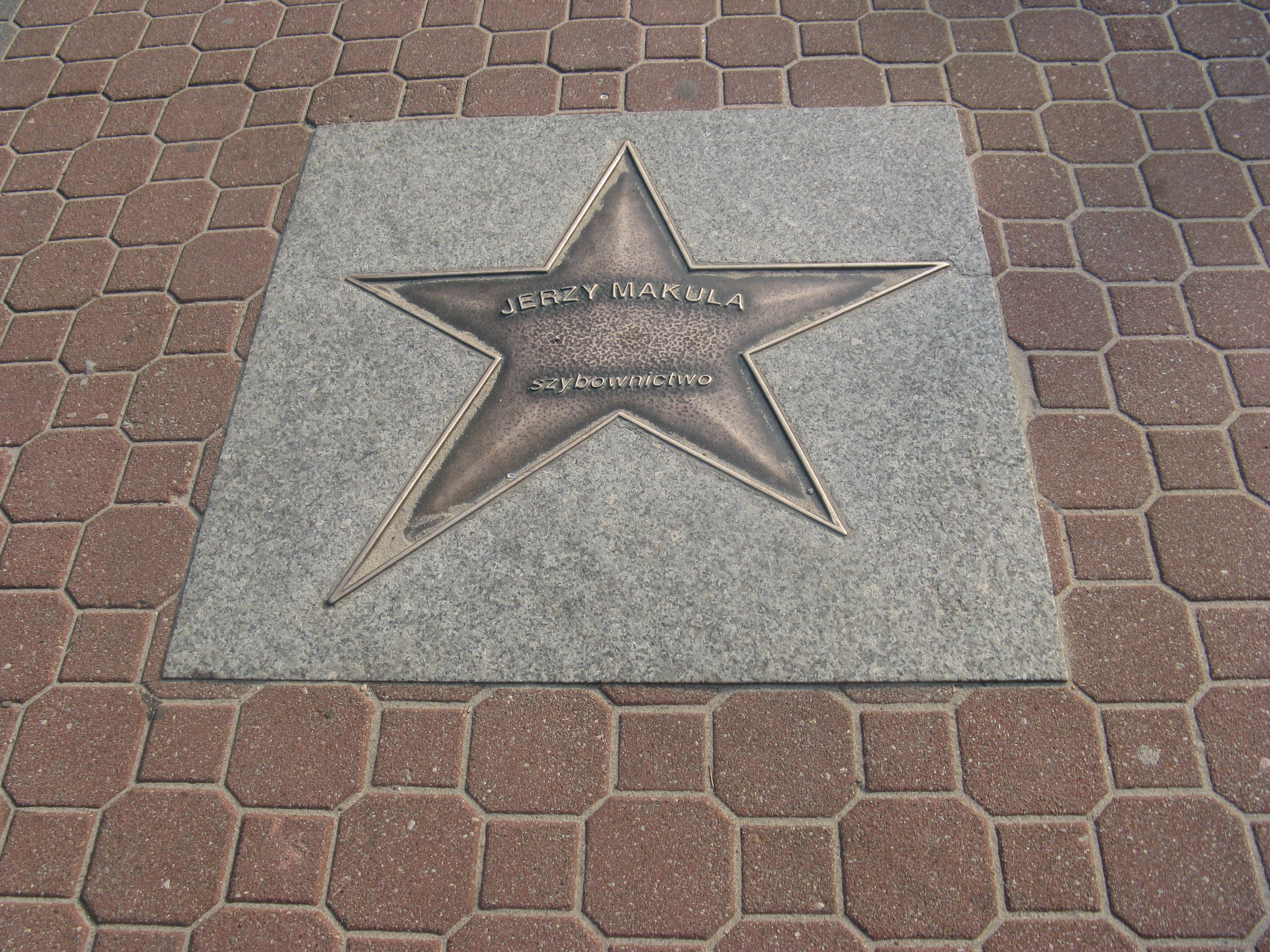 Gwiazda szybownika Jerzego Makuli w Alei Gwiazd sportu we Władysławowie.